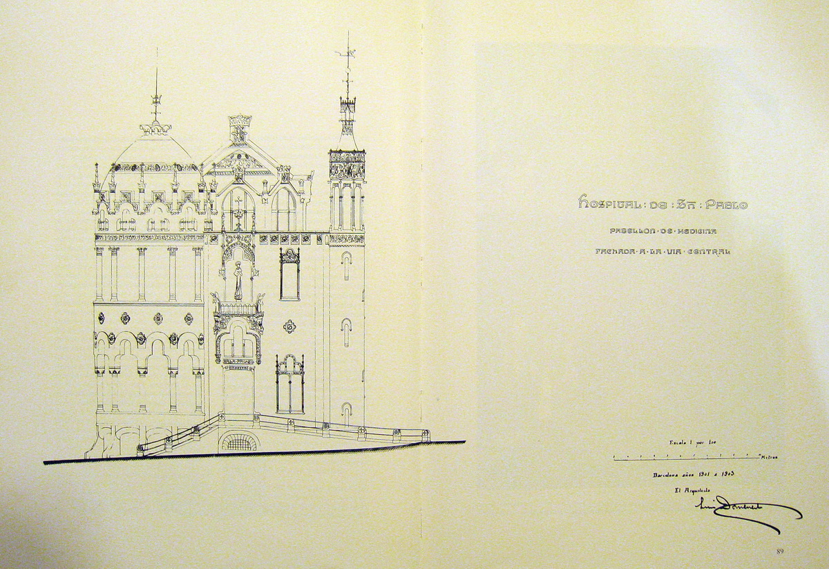 Alçat d'un pavelló de l'Hospital de Sant Pau (1903) (Catalunya)